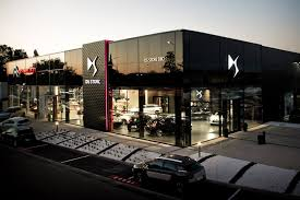 DS Store